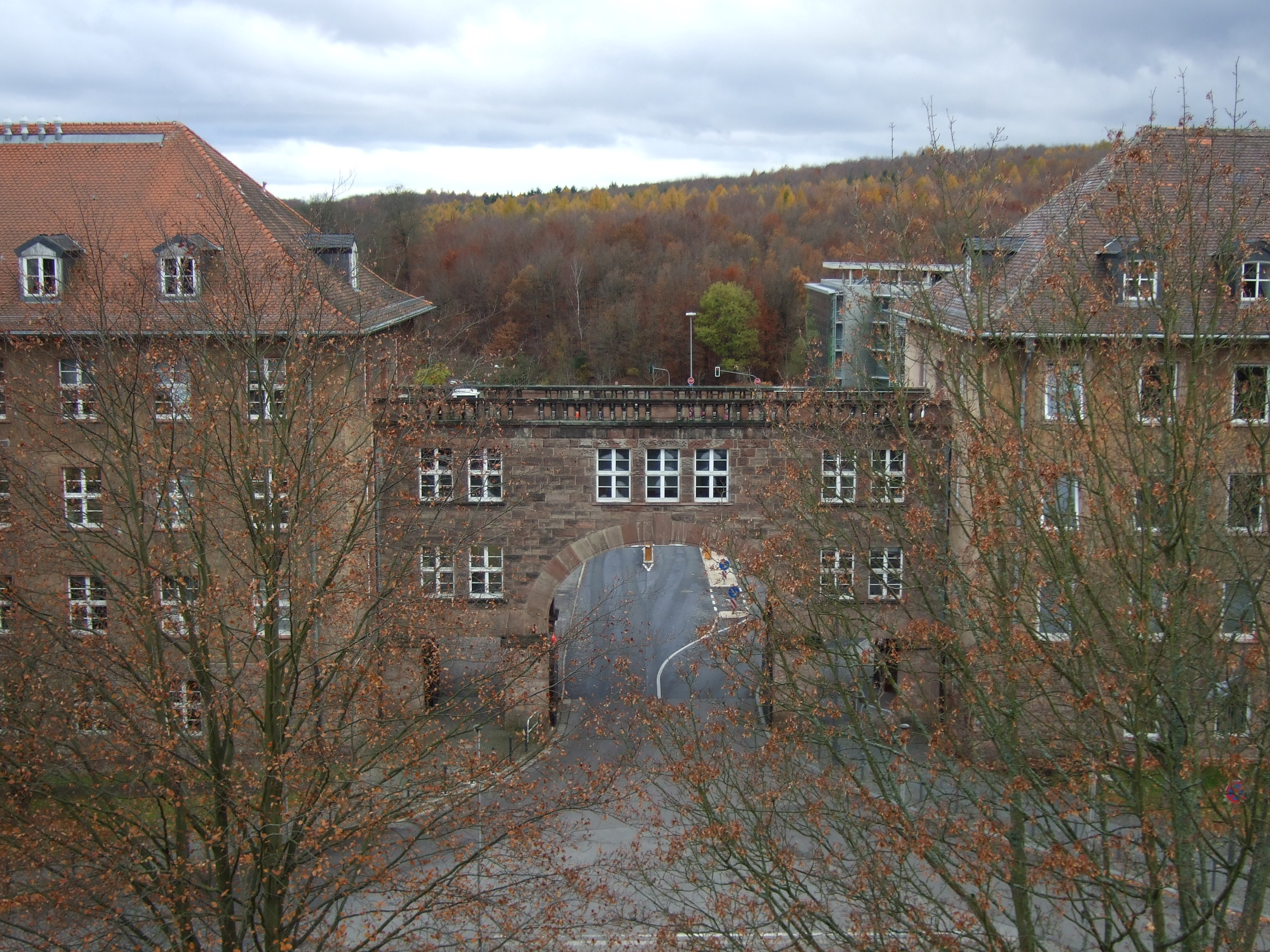 Hauptportal Universität des Saarlandes Herbst